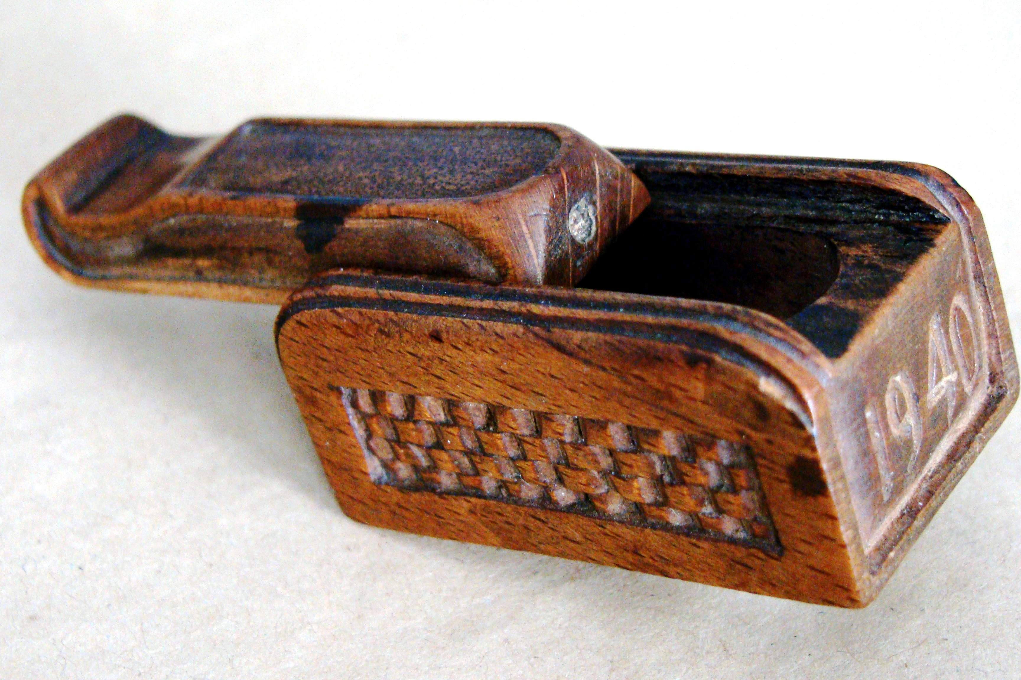 Miniaturowy piórniczek wykonany w drewnie przez Borutę podczas pobytu w Oflagu ze swoimi inicjałami dla nowonarodzonej córeczki.